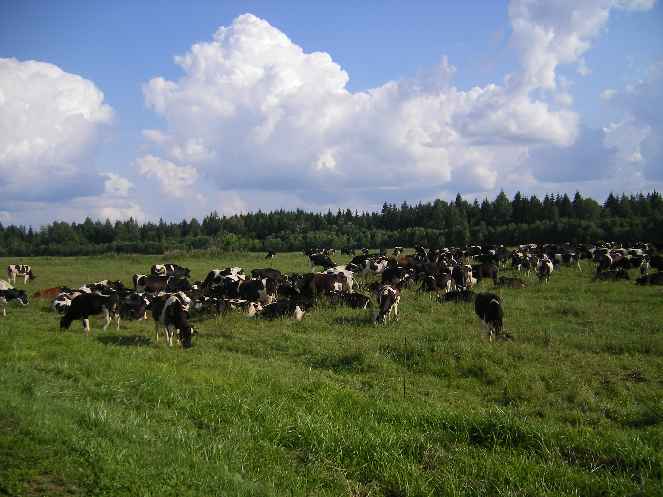 Cattle in Shumilino district